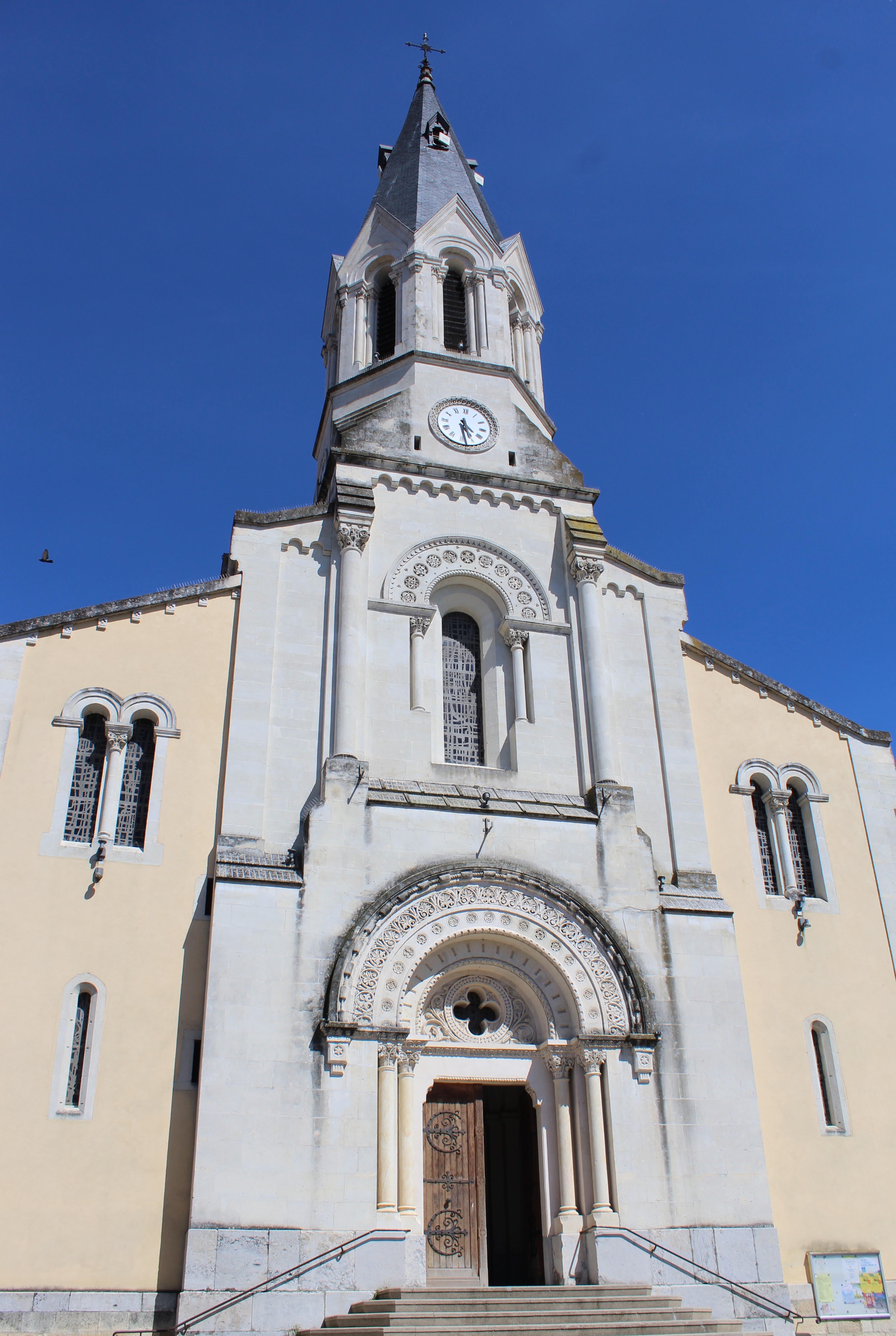 L'église.